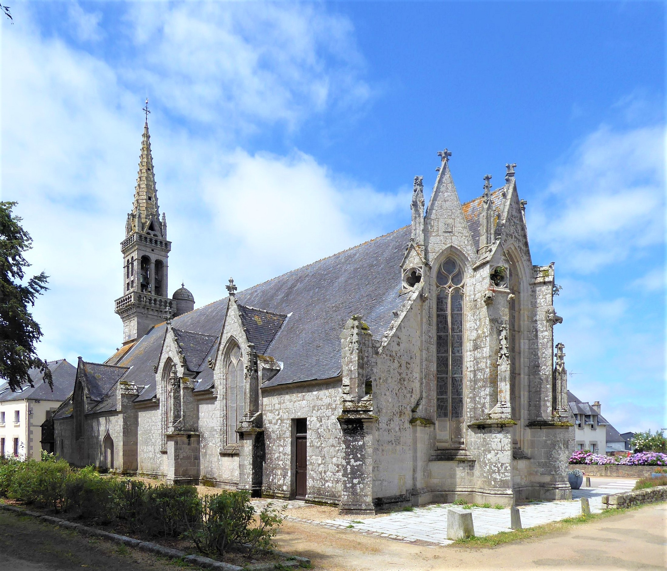 Église Notre-Dame (Confort-Meilars)